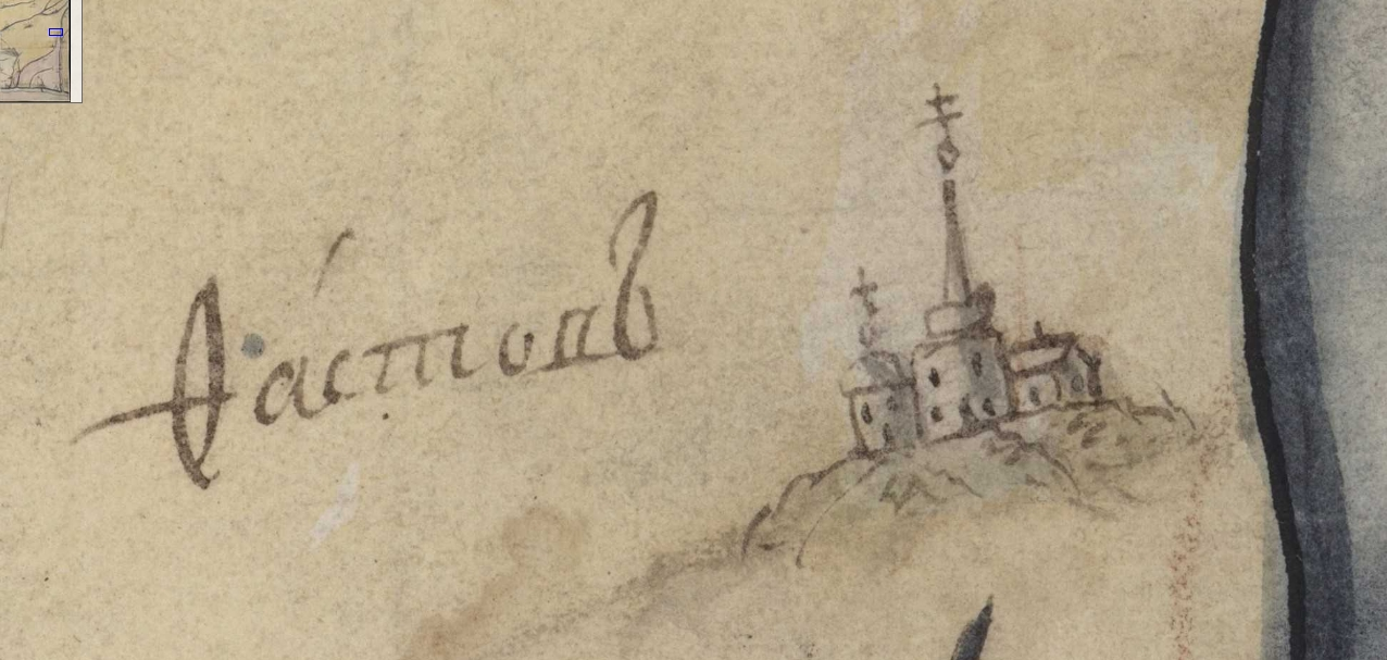 Фрагмент карти Київської губернії. XVIII століття. РГАДА, ф. 192, оп. 1, Киевская губ., № 5.